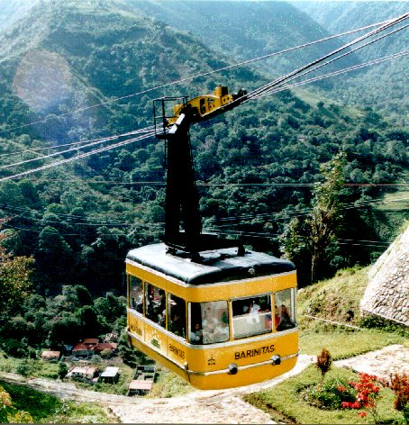 Eigen werk, Merida, feb. 2002